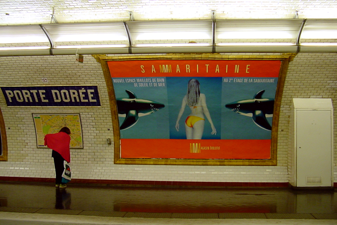 Porte Dorée metro station